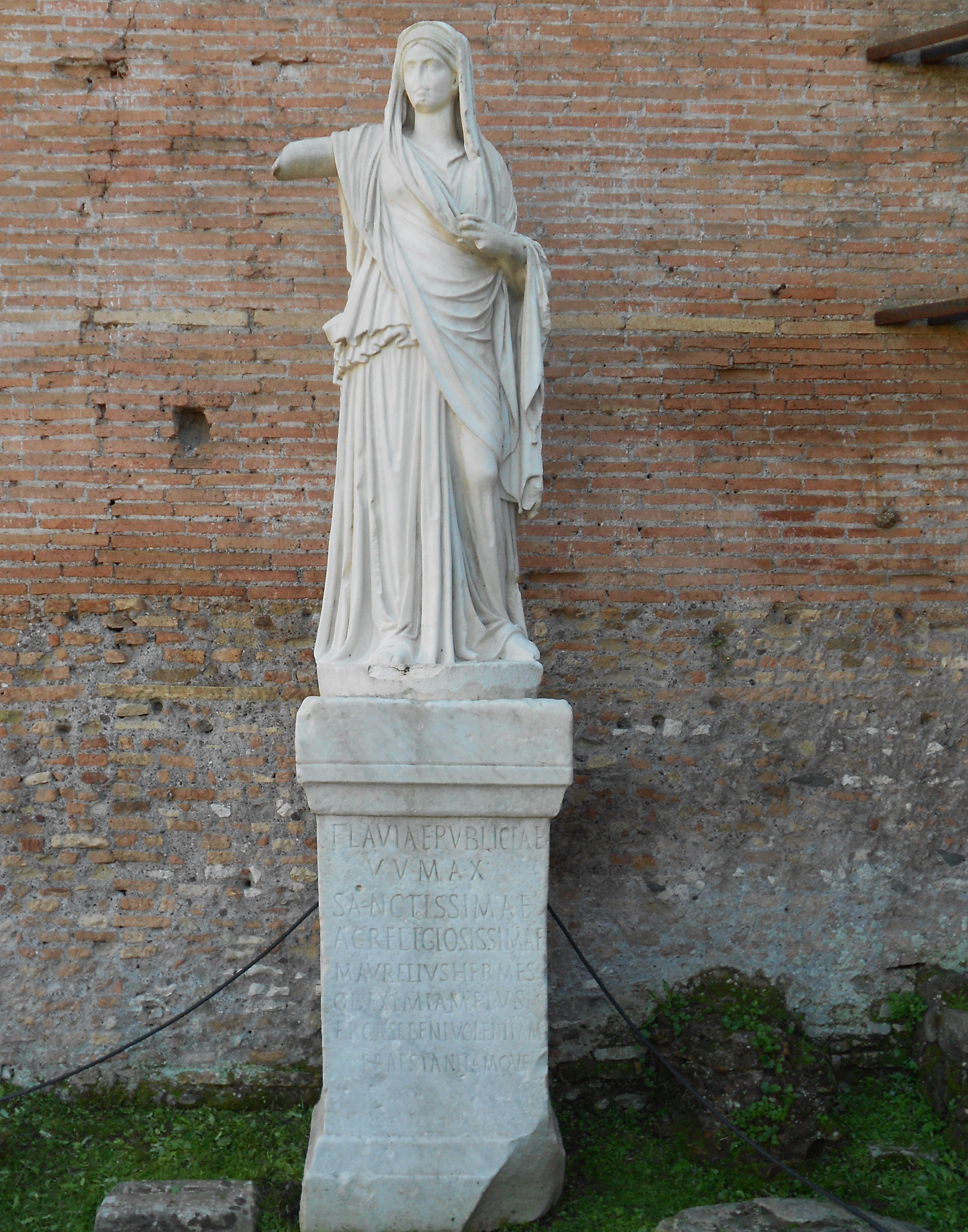 Statue einer Vestalin aus dem Atrium